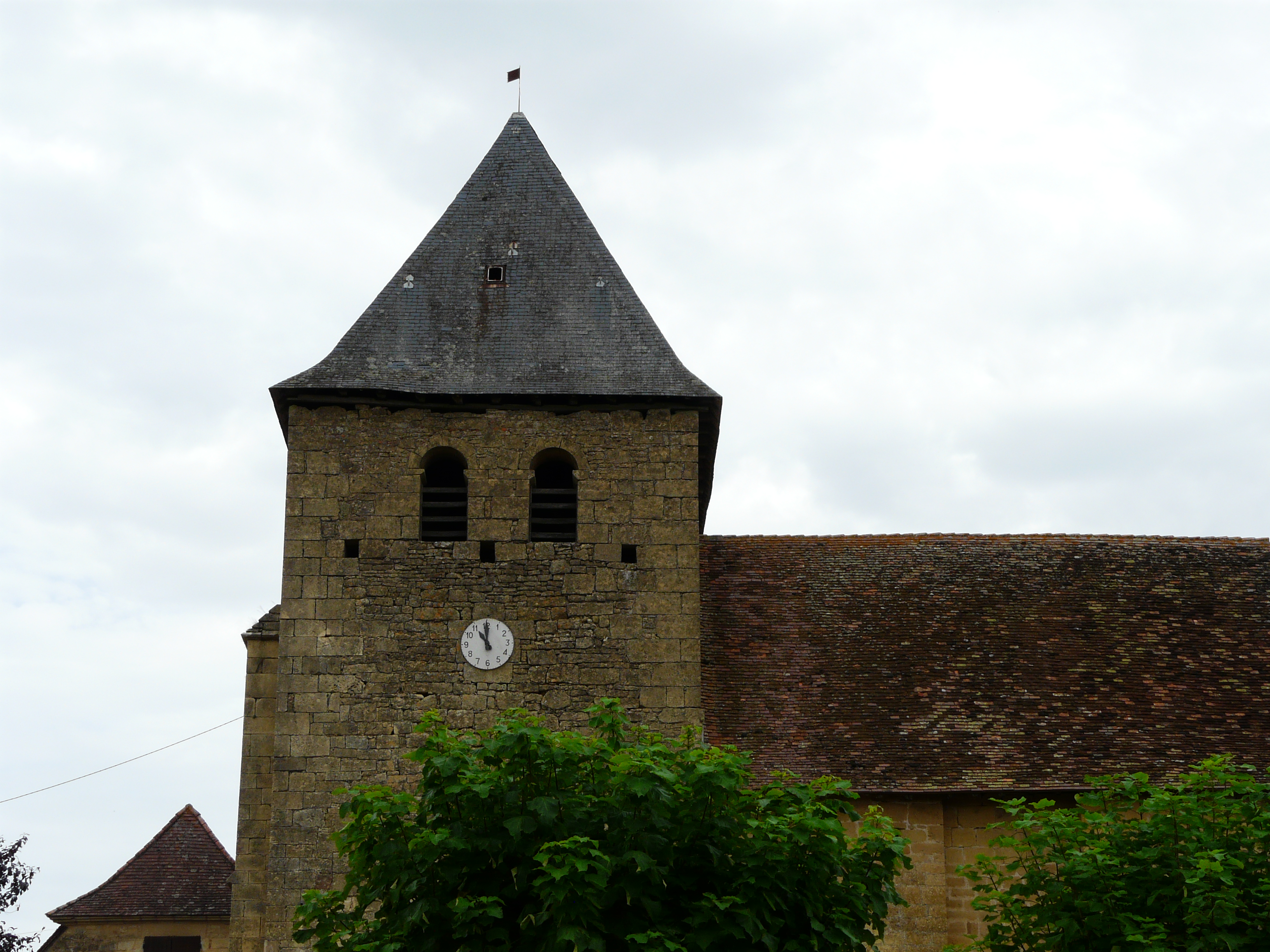 La façade sud de l'église Saint-Césaire de Saint-Sulpice-d'Excideuil, Dordogne, France. .